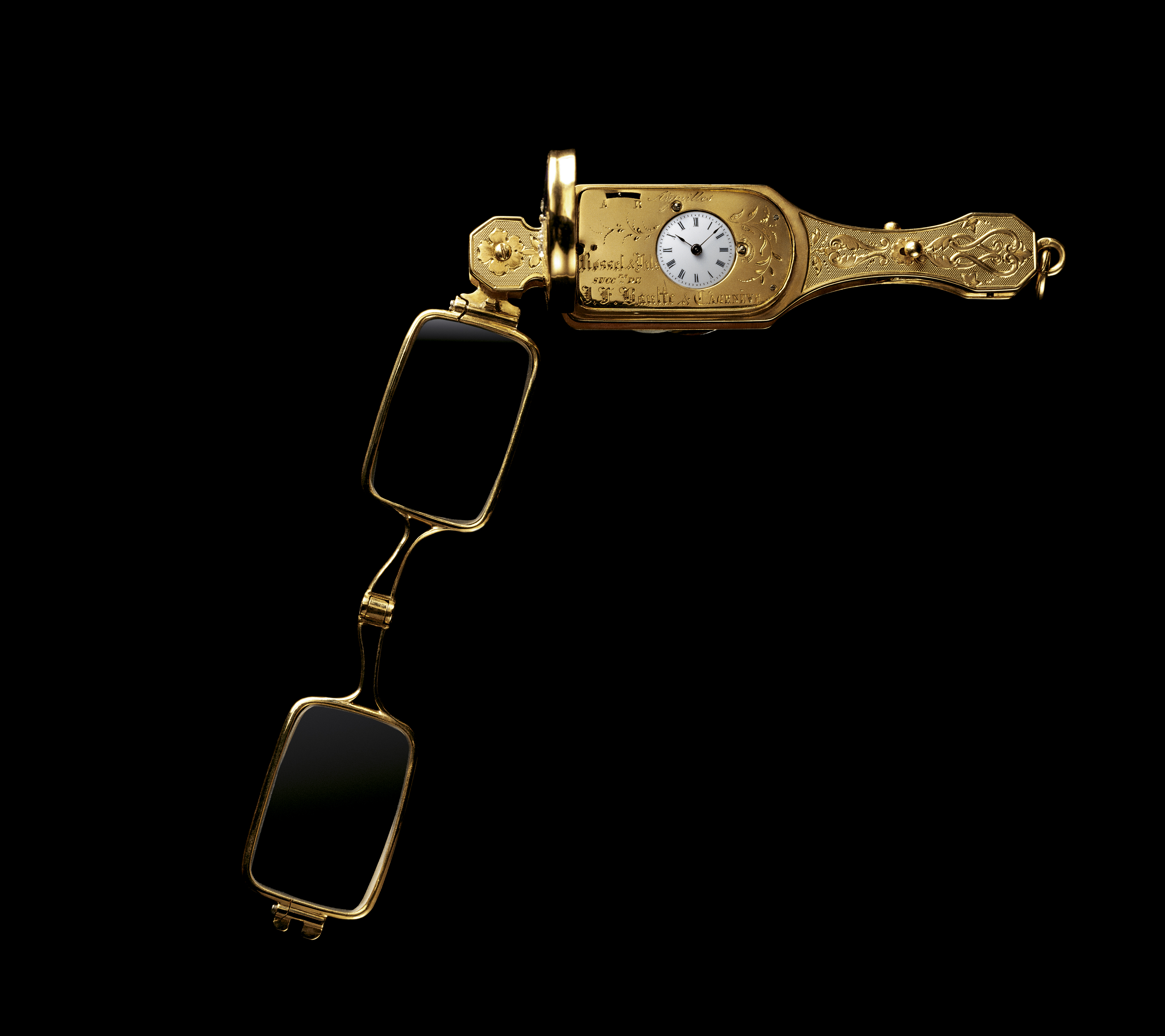 Face-à-main signé Rossel & Fils, vers 1860. Boîtier en or jaune décoré d’émail bleu translucide et de motifs floraux en diamants. Les lunettes se plient et prennent place dans le manche muni d’une montre. Mouvement à échappement à cylindre.